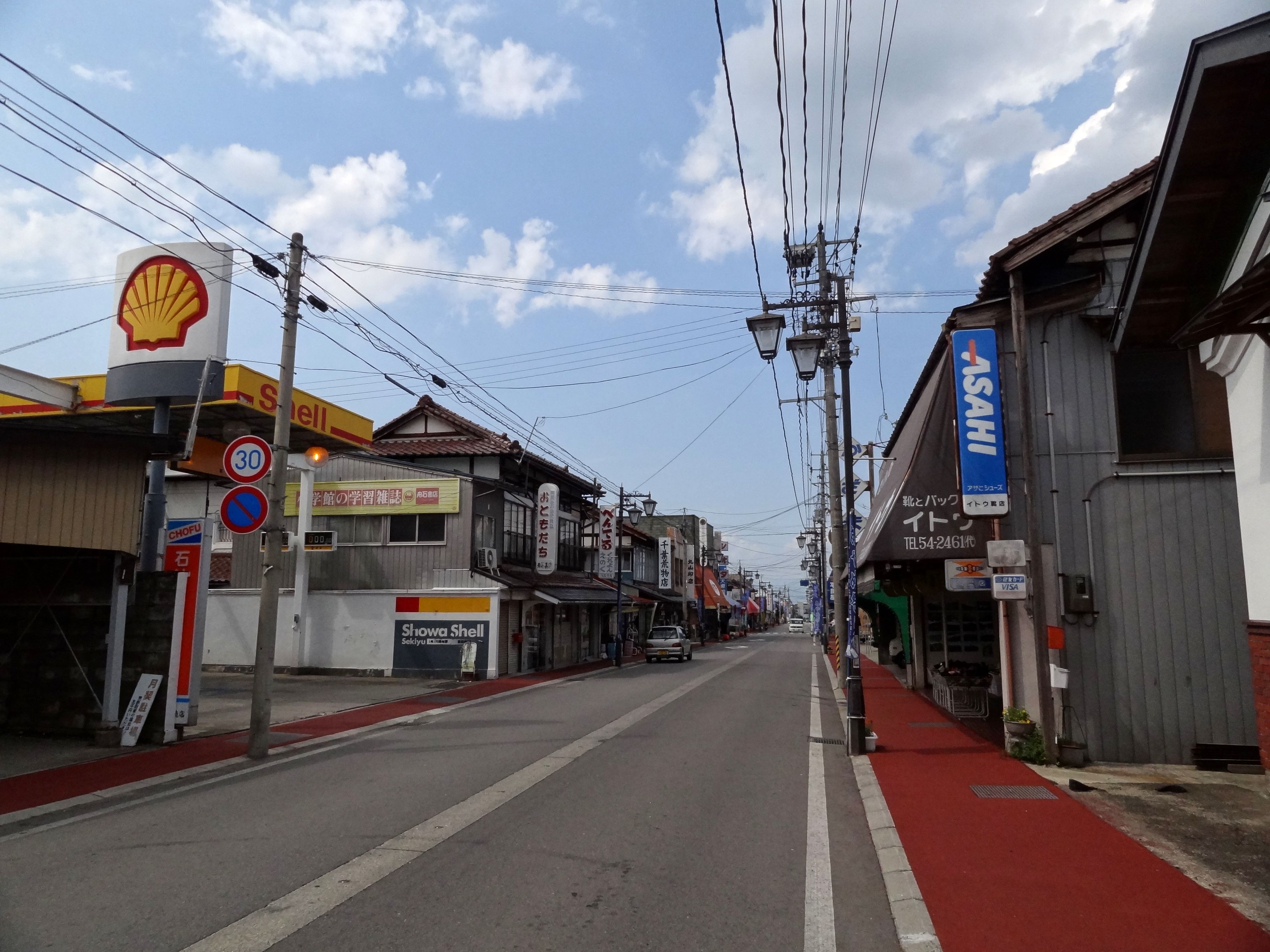 会津美里町中心部（会津高田市街）